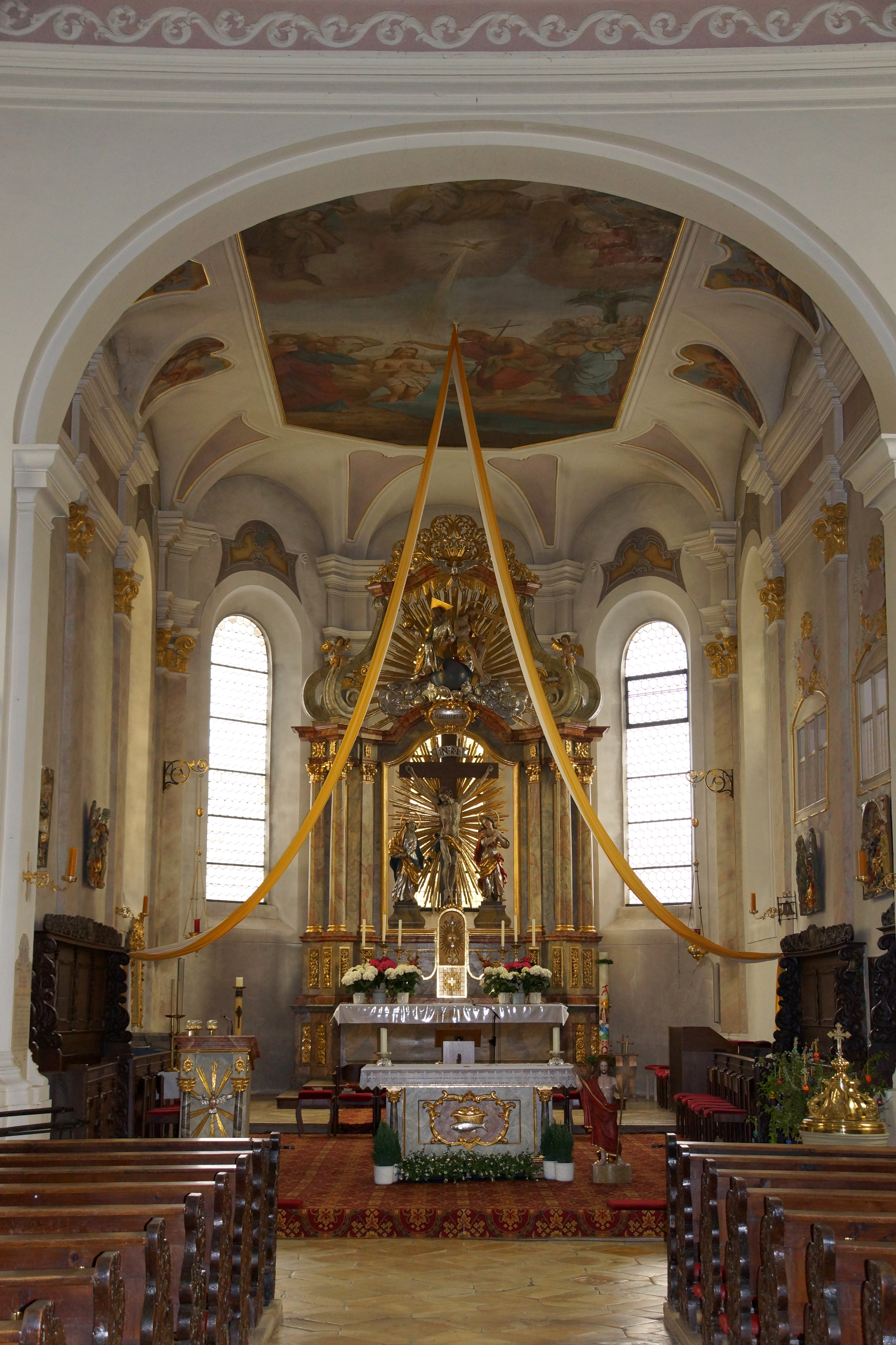 Die katholische Pfarrkirche St. Johannes der Täufer in Hemau in der Oberpfalz